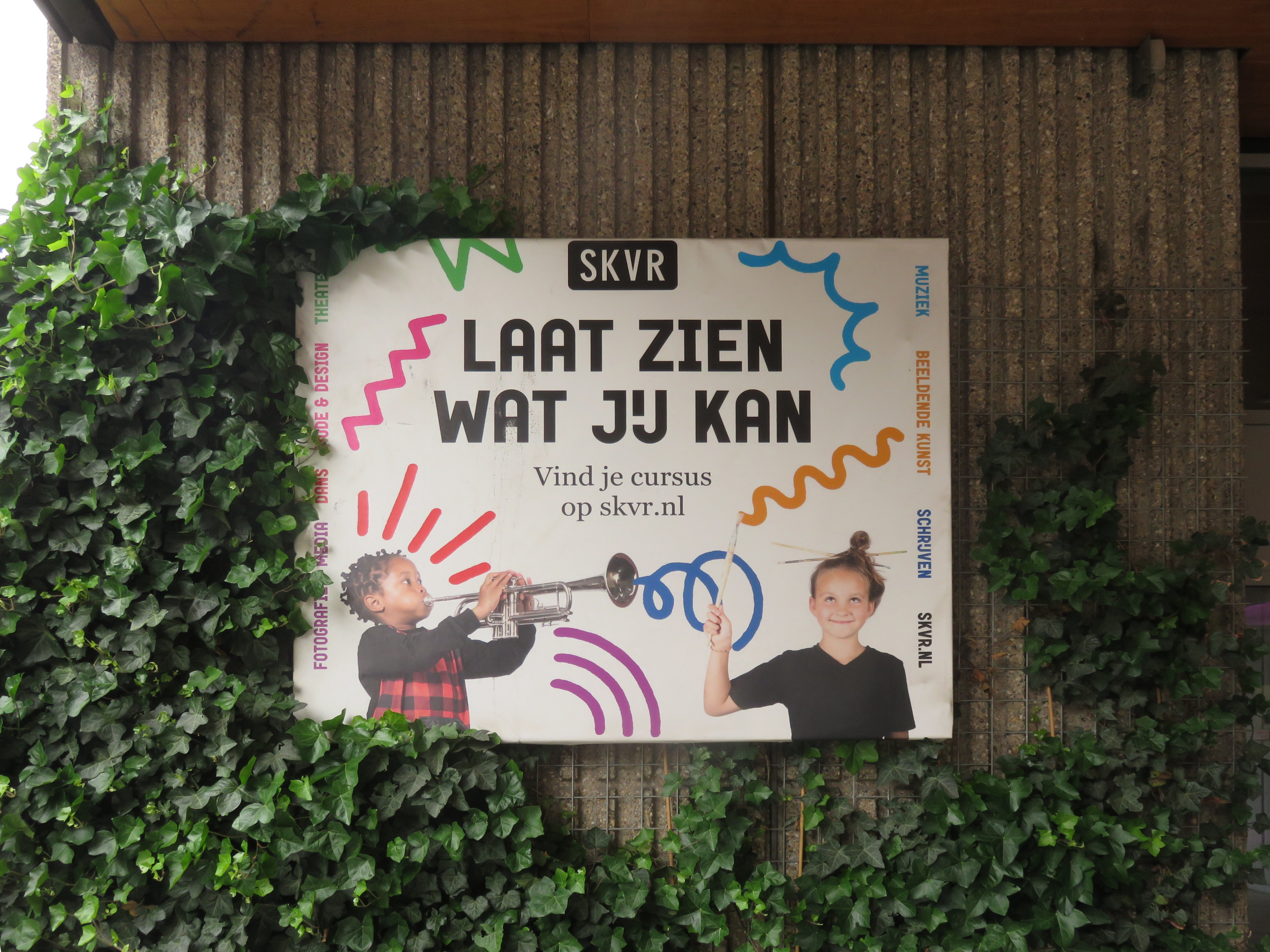 SKVR Aert van Nesstraat 45, Rotterdam entree